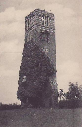 De Stompe Toren in Woensdrecht, gebouwd in de 15e eeuw, opgeblazen door de Duitsers in 1944.